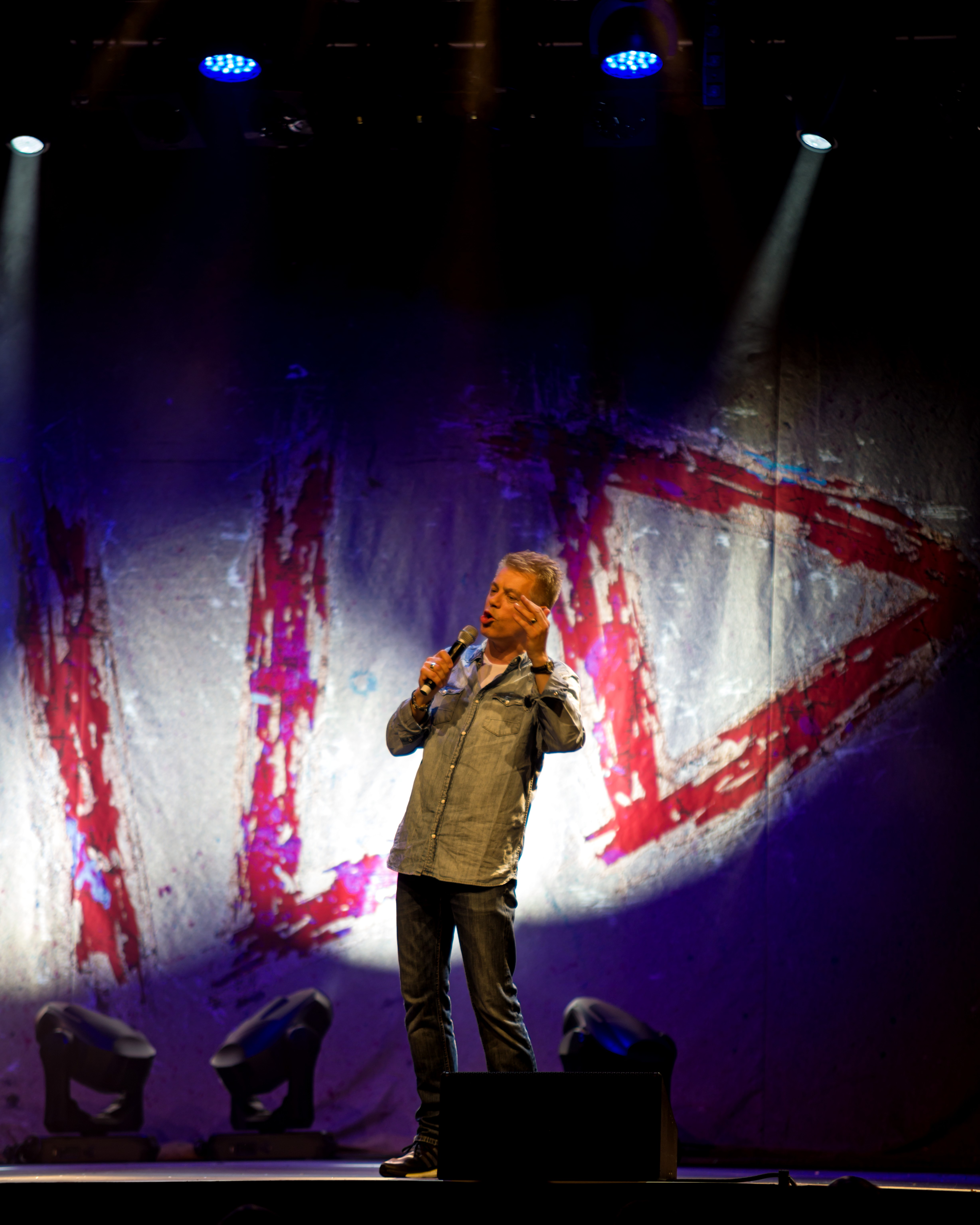 Bilder vom Zelt Musik Festival 2017 in Freiburg im Breisgau Michael Mittermeier "Wild" (ZMF 2017)